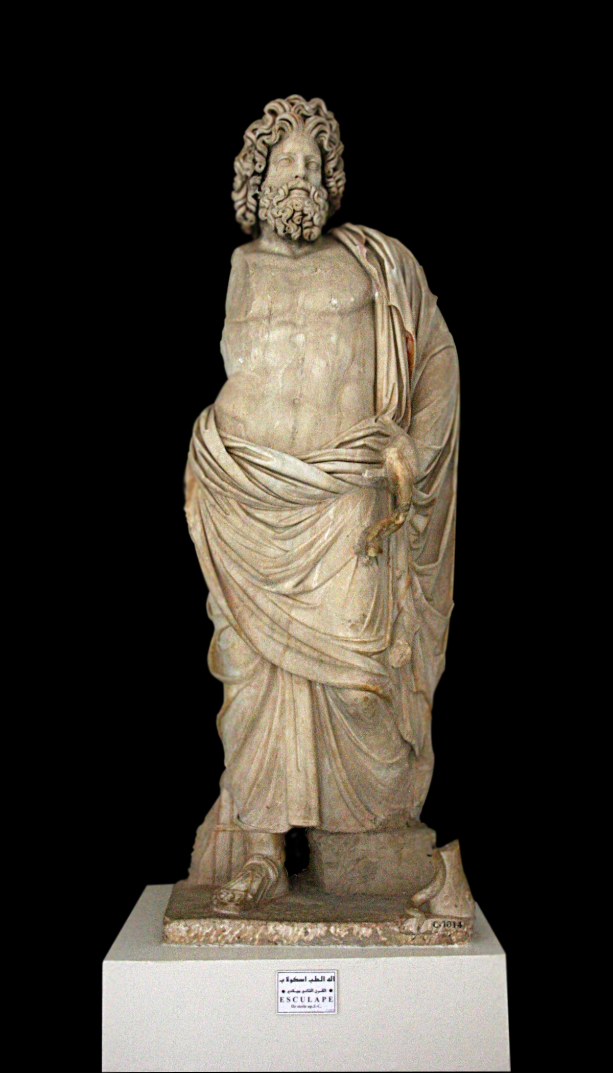 Photo perso prise en août 2007 au musée du Bardo en Tunisie représentant une statue du dieu romain Esculape, découverte à Bulla Regia.